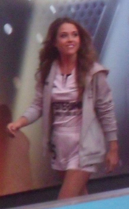 Team Bachelor bei der ProSieben Völkerball Meisterschaft